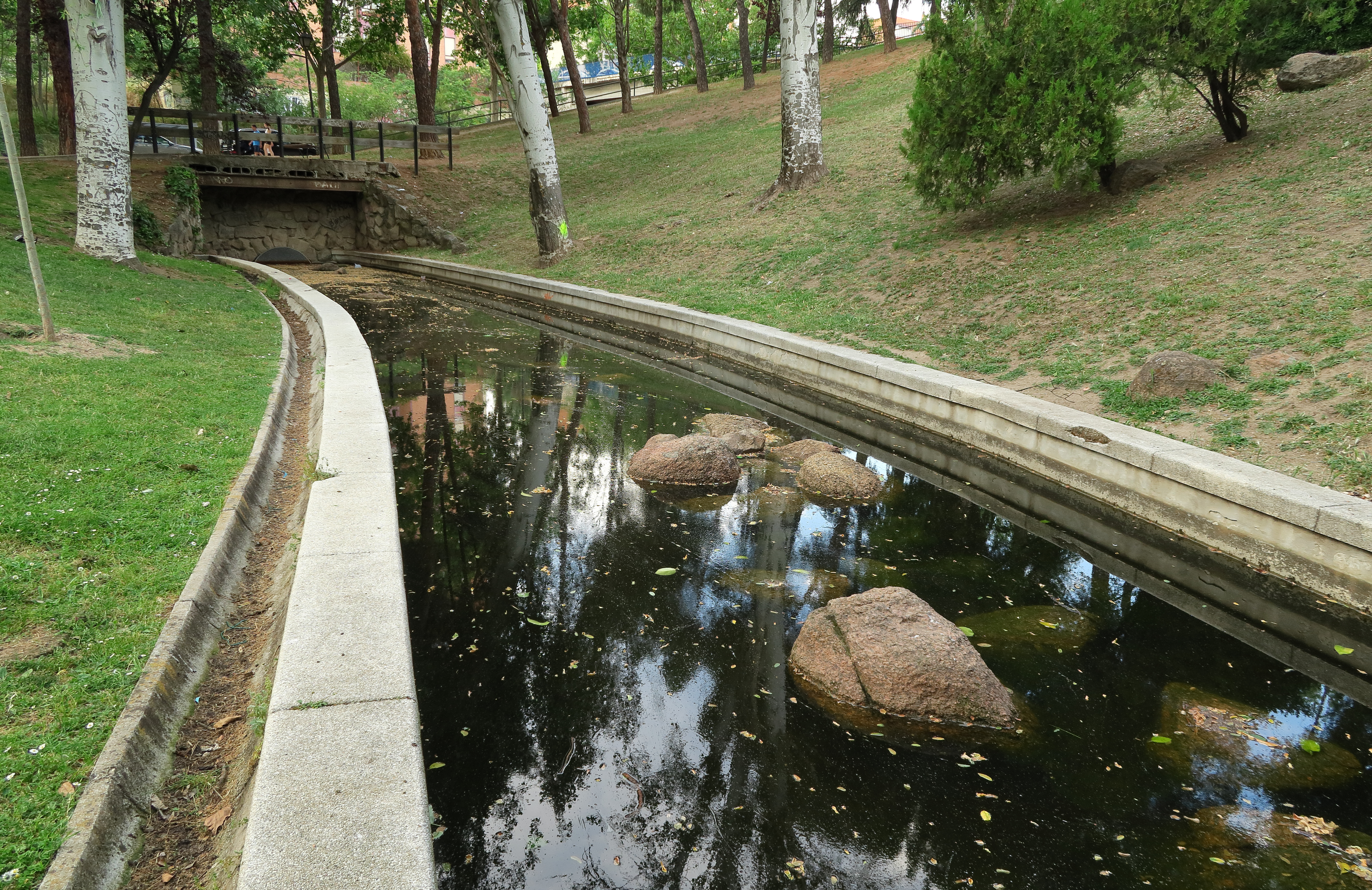 El Canalillo, Parque de Ofelia Nieto, 05